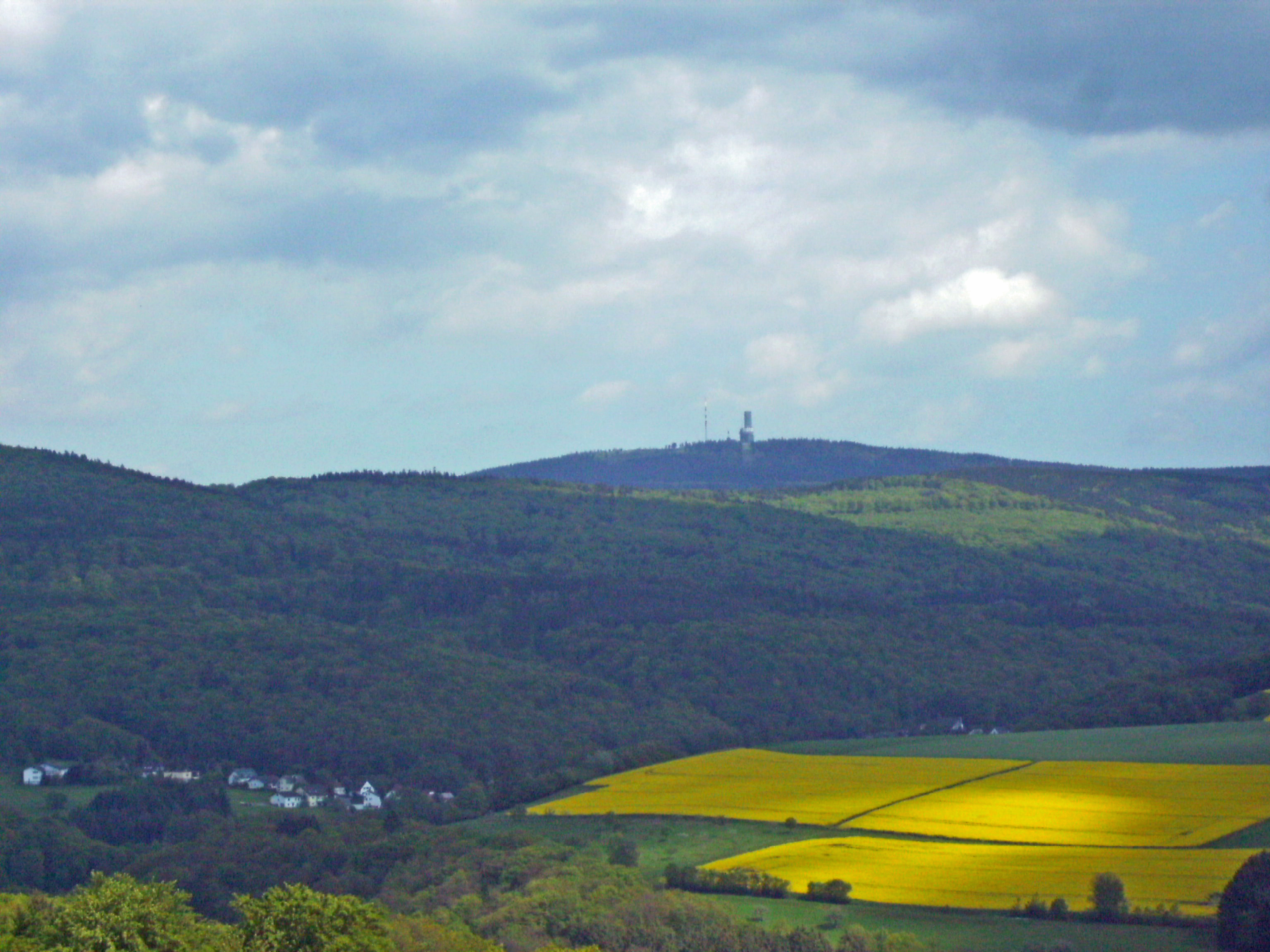 Bild von Reinborn auf den Feldberg/Ts.